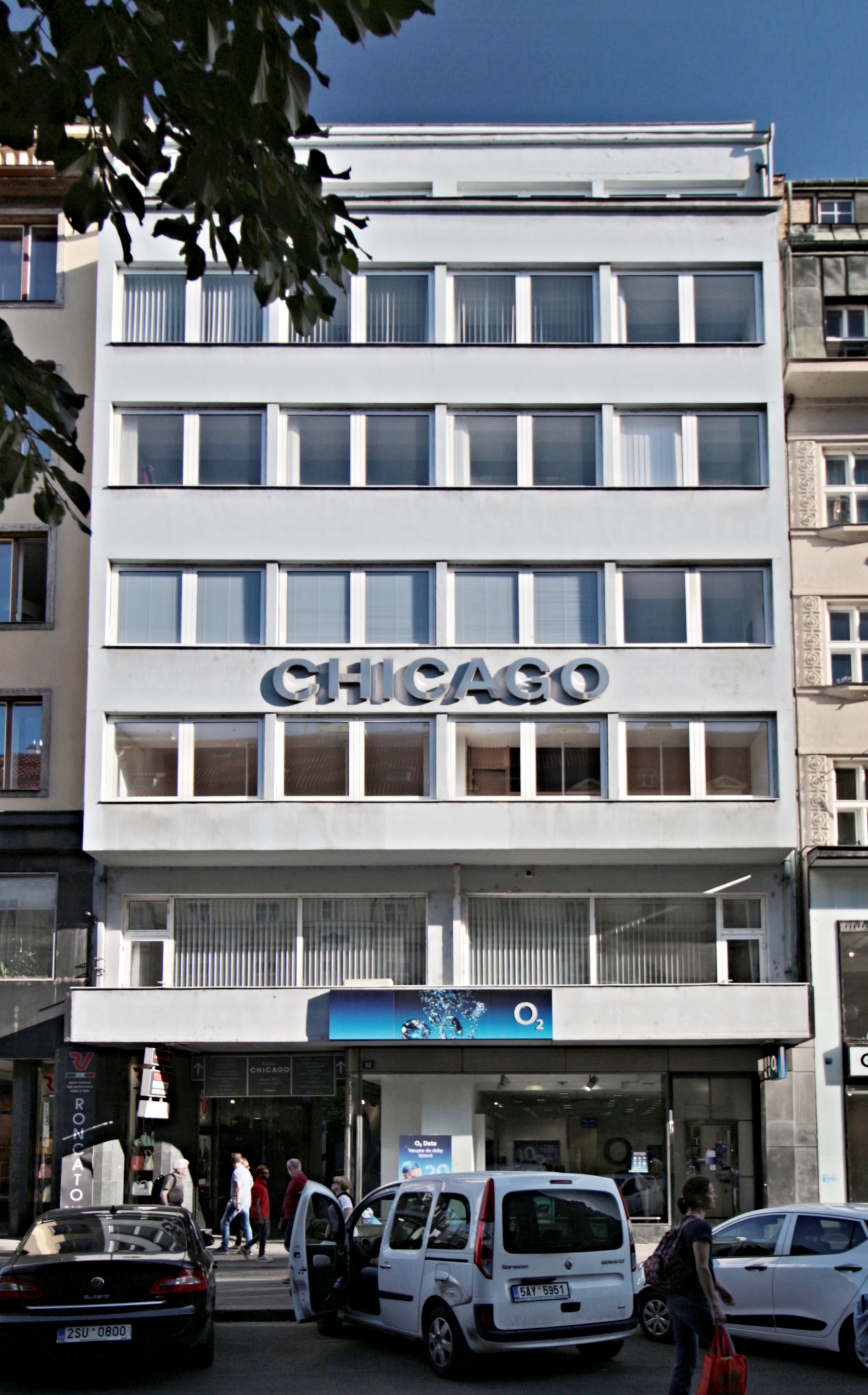 Kolowratovy domy: Palác Chicago